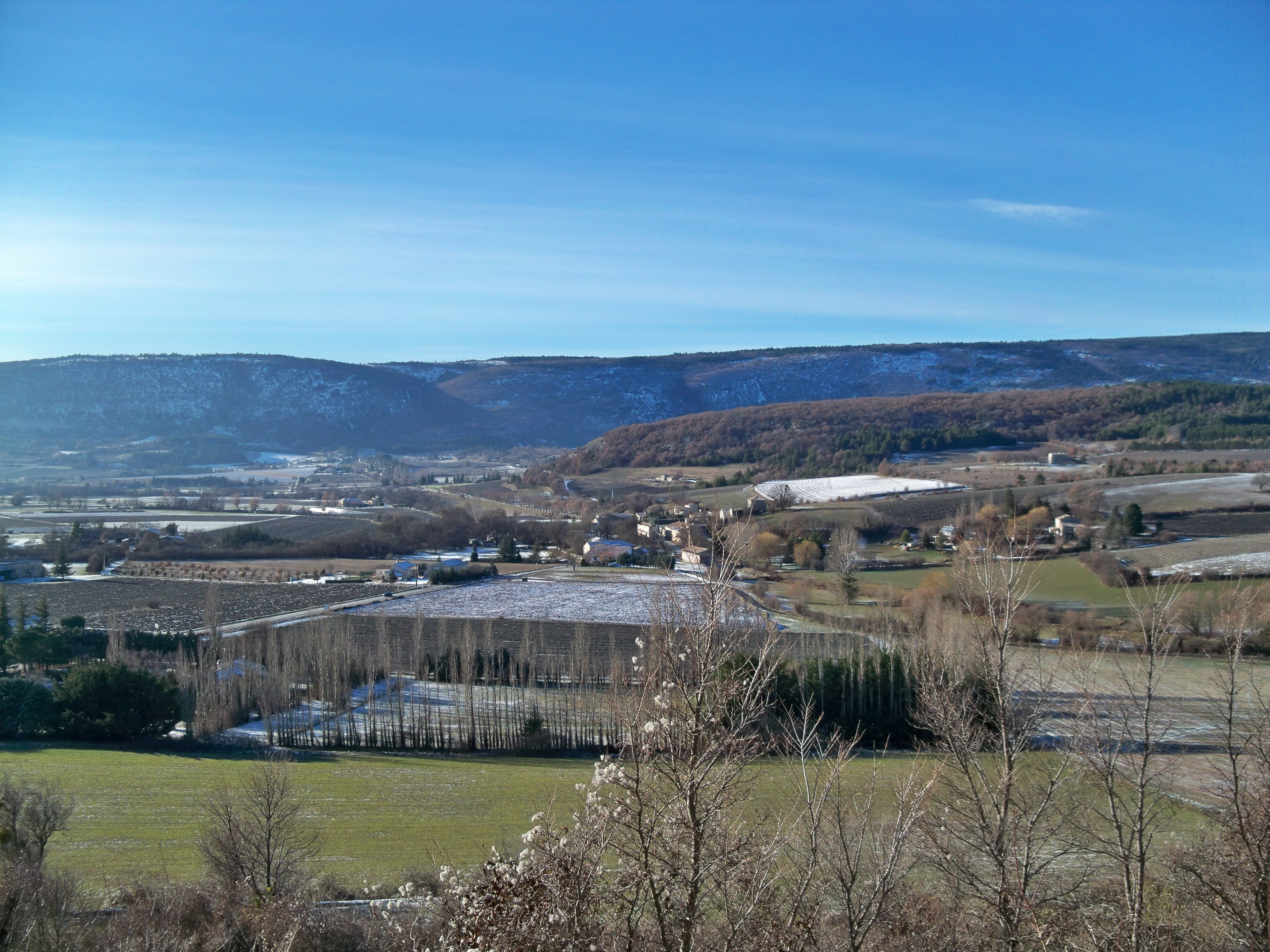 Paysage autour de Sault (Vaucluse)